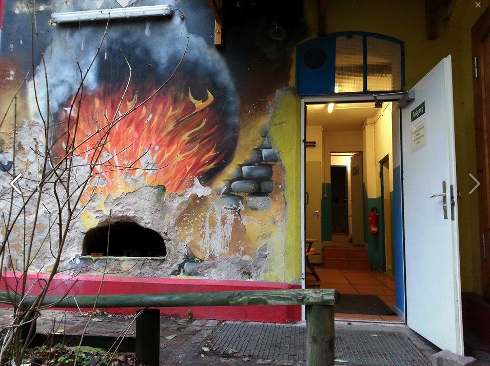 Regenbogenfabrik (Feuerstelle - Kamin) - 1981 besetztes und heute legales Alternativprojekt in Berlin-Kreuzberg, Germany.